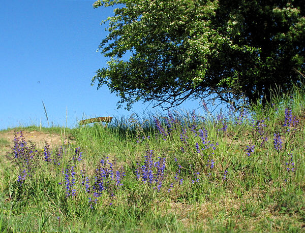 Wilder Salbei auf der Insel Neuenhagen